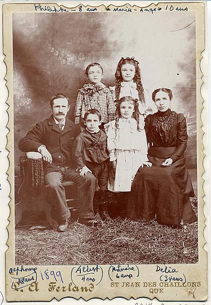 Cette photographie prise par un photographe ambulant en 1899 représente la famille Tessier de Sainte-Anne-de-la-Pérade. Debout à l'arrière, il y a Philippe, 8 ans, et Marie-Ange, 10 ans. Dans la première rangée, nous retrouvons le père, Alphonse, 38 ans, Albert, 4 ans, Marie-Louise, 6 ans, et tante Délia Tessier, 34 ans, soeur d'Alphonse, qui remplaça la maman, Sophie Rompré, décédée en 1897.